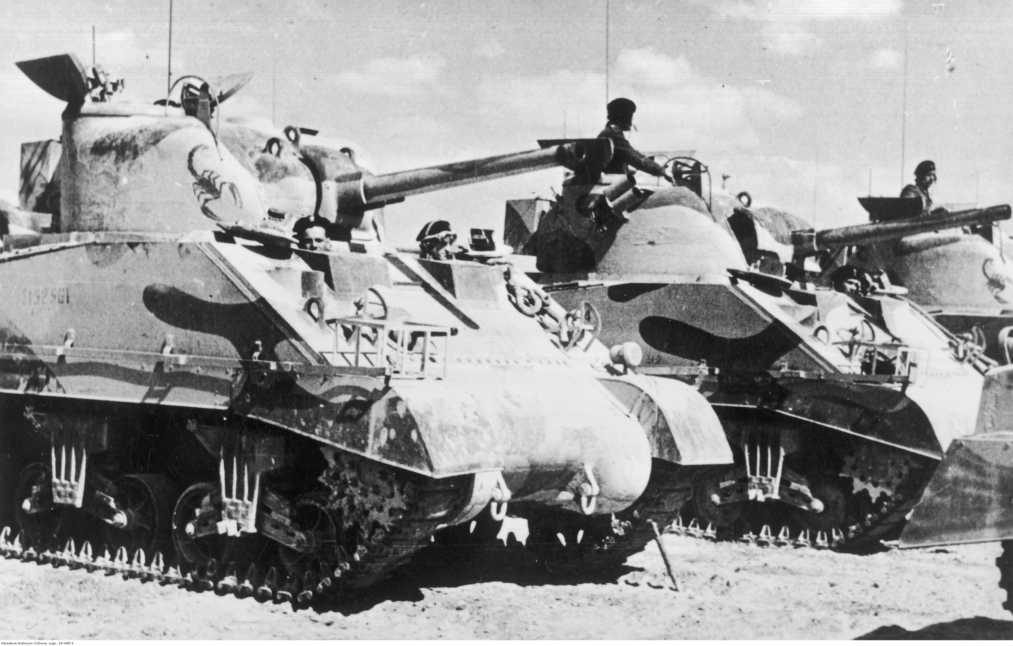 Samodzielna 2 Brygada Pancerna w Egipcie; 1943. Czołgi M4 Sherman z 4 Pułku Pancernego "Skorpion" przed defiladą. Na pancerzach widoczny jest znak pułku. Archiwum Fotograficzne Tadeusza Szumańskiego. Sygnatura: 24-405-1